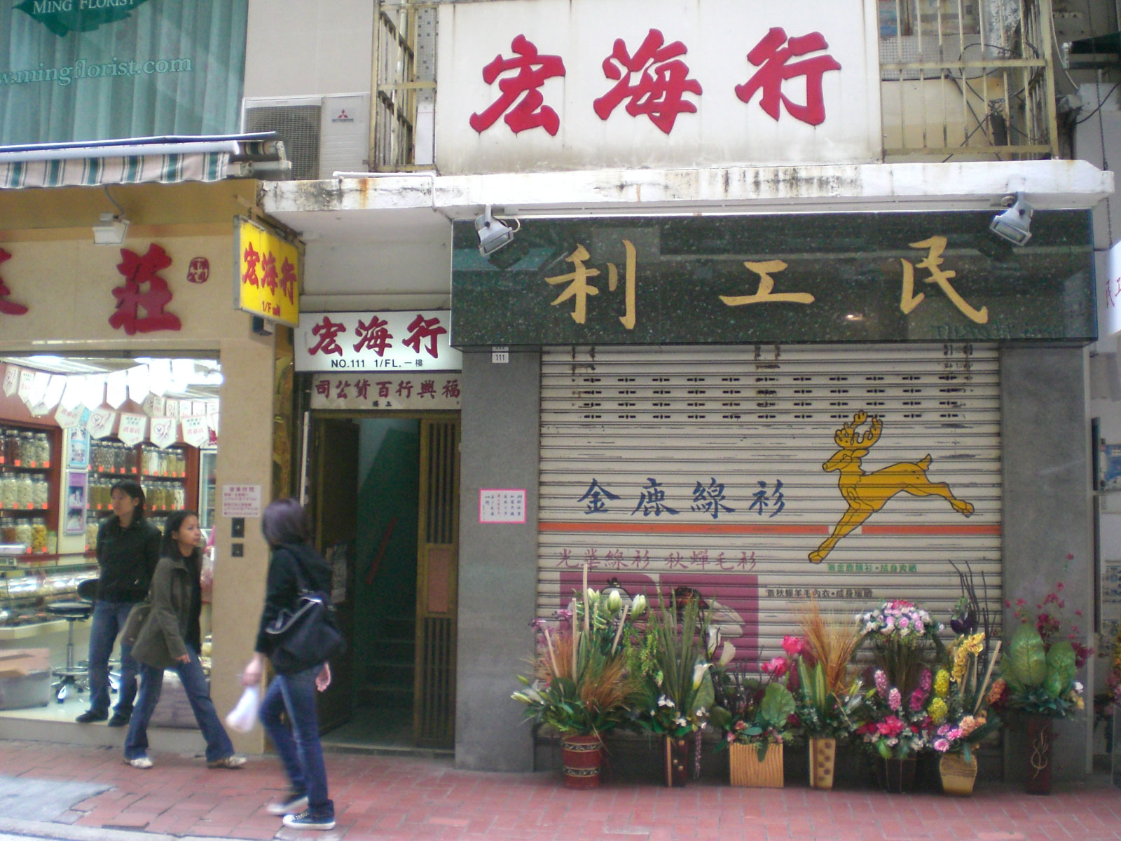 利工民上環永樂街111號門市部.